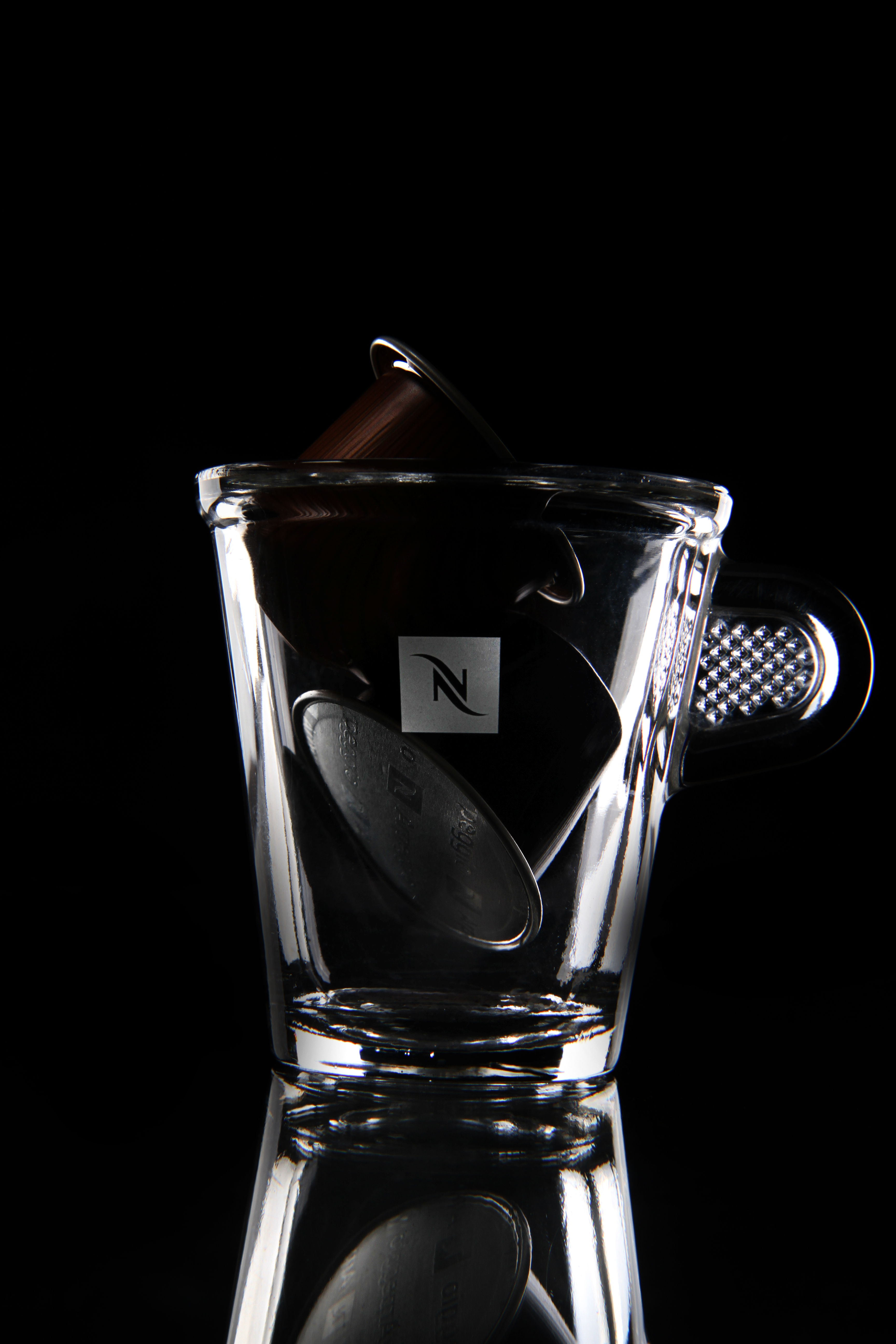 כוס נספרסו